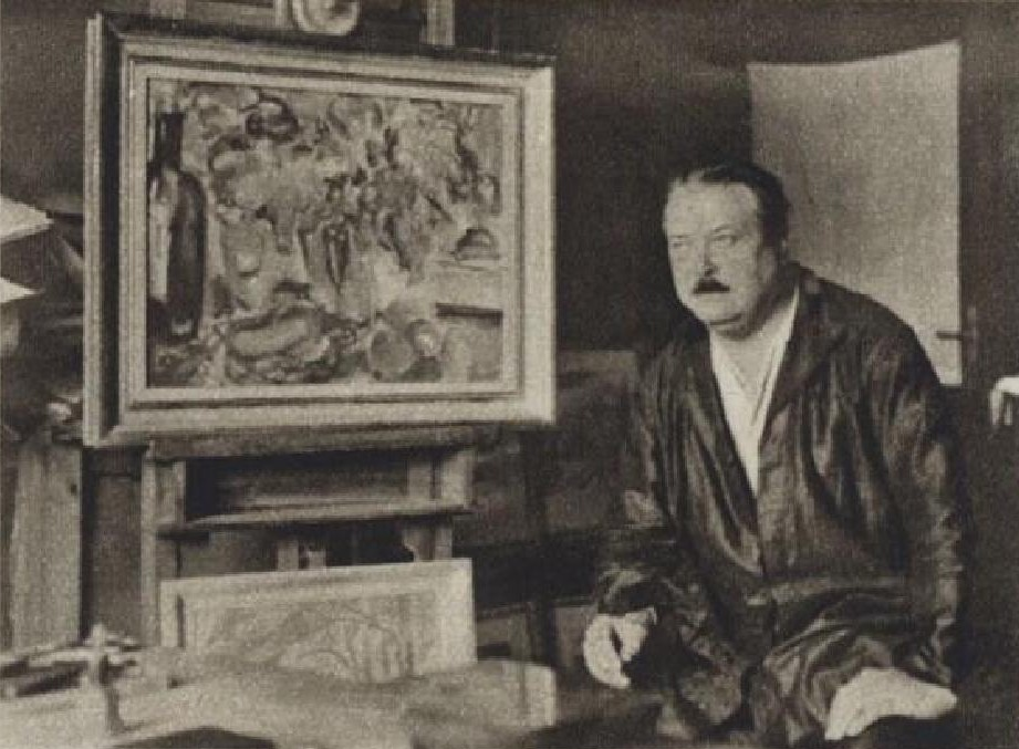 Václav Mašek (1893-1973), český malíř, ilustrátor, typograf, grafik